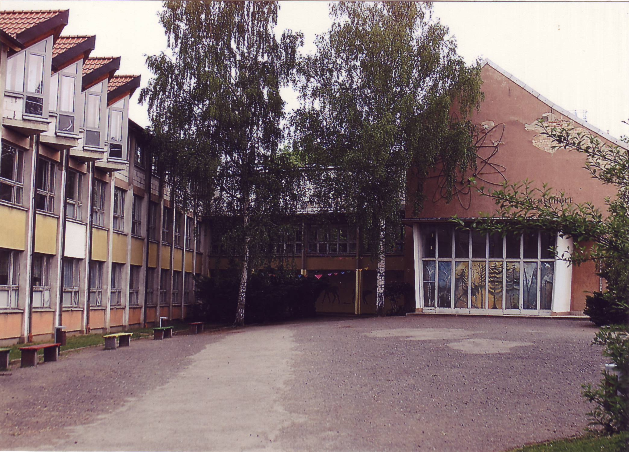 Ehemalige Mittelschule Jocketa (bis 2005)